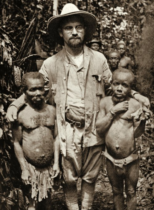 Pavel Jáchym Šebesta (1887 - 1967), Český misionář, etnograf, antropolog a lingvista - u pygmejů.